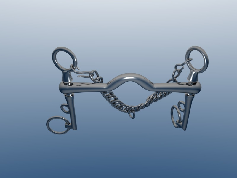 a curb bit with port mouthpiece and curb chain. Un mors de bride à pompe, également appelé "Saumur", avec passage de langue sur le canon. Les branches disposent de 2 degrés de liberté (rotation + translation) par rapport au canon. Modélisé sous Blender par LardonCru.